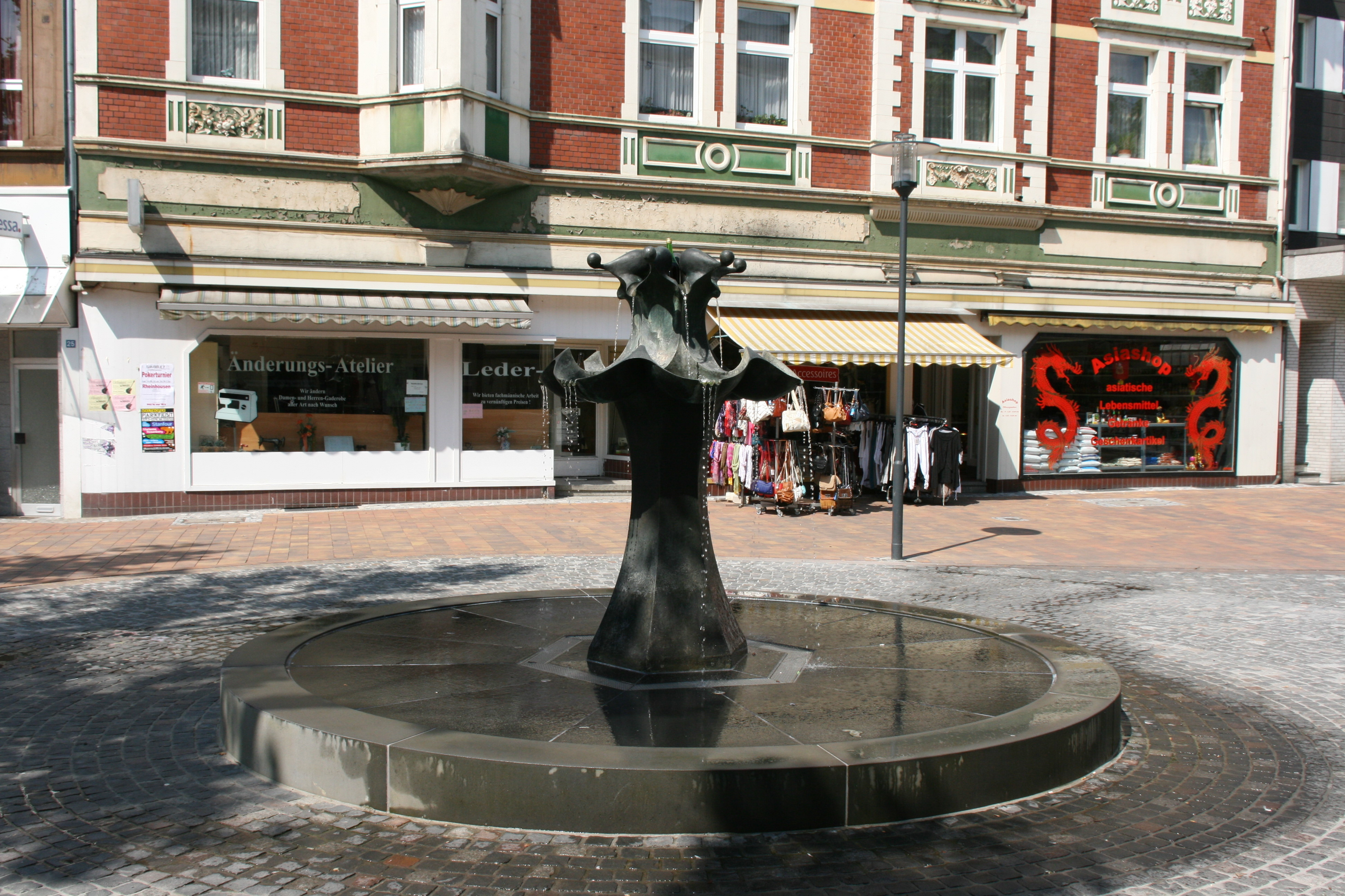 Brunnensäule von Waldemar Wien am Übergang Antoniusstraße / Ewaldstraße in Herten